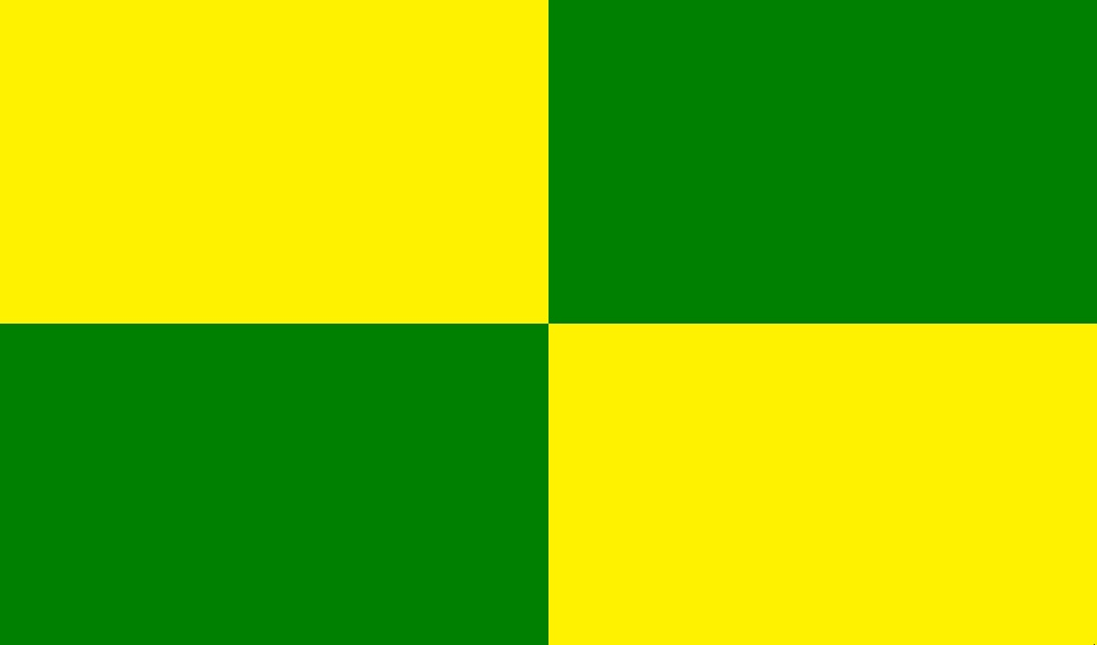 Bandera de Quinsaloma